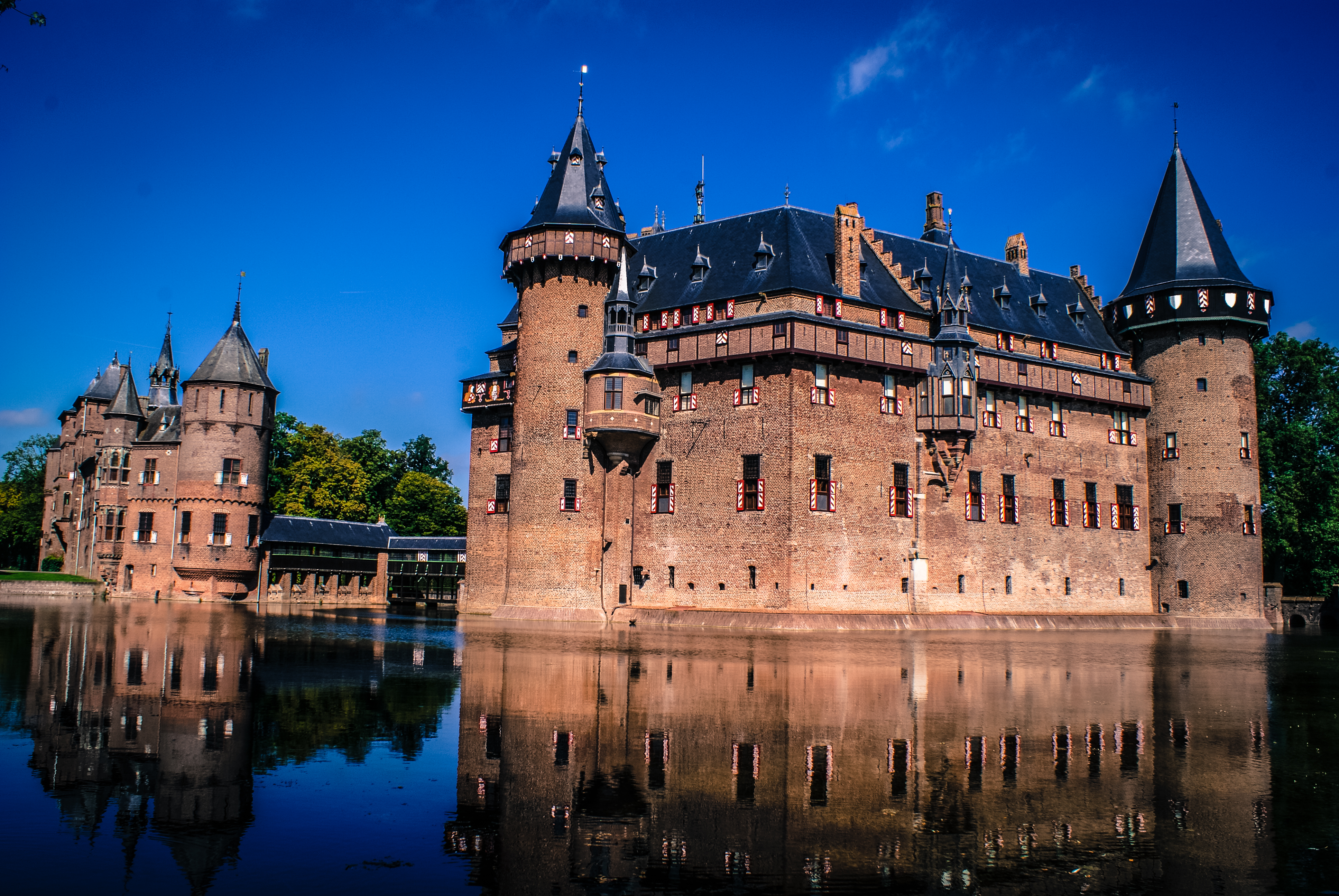 vista desde los jardines